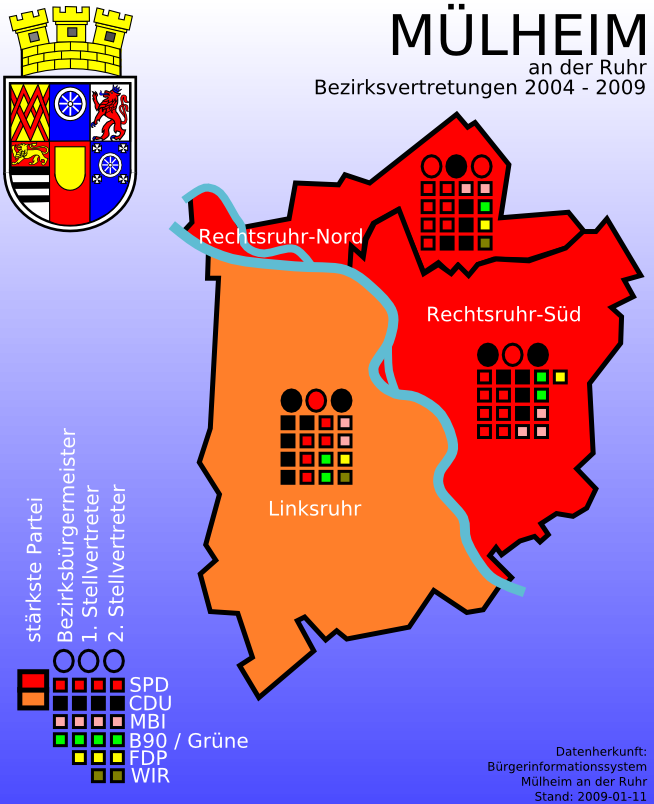 Bezirksvertretungen der drei Bezirke der Stadt Mülheim an der Ruhr, Nordrhein-Westfalen.